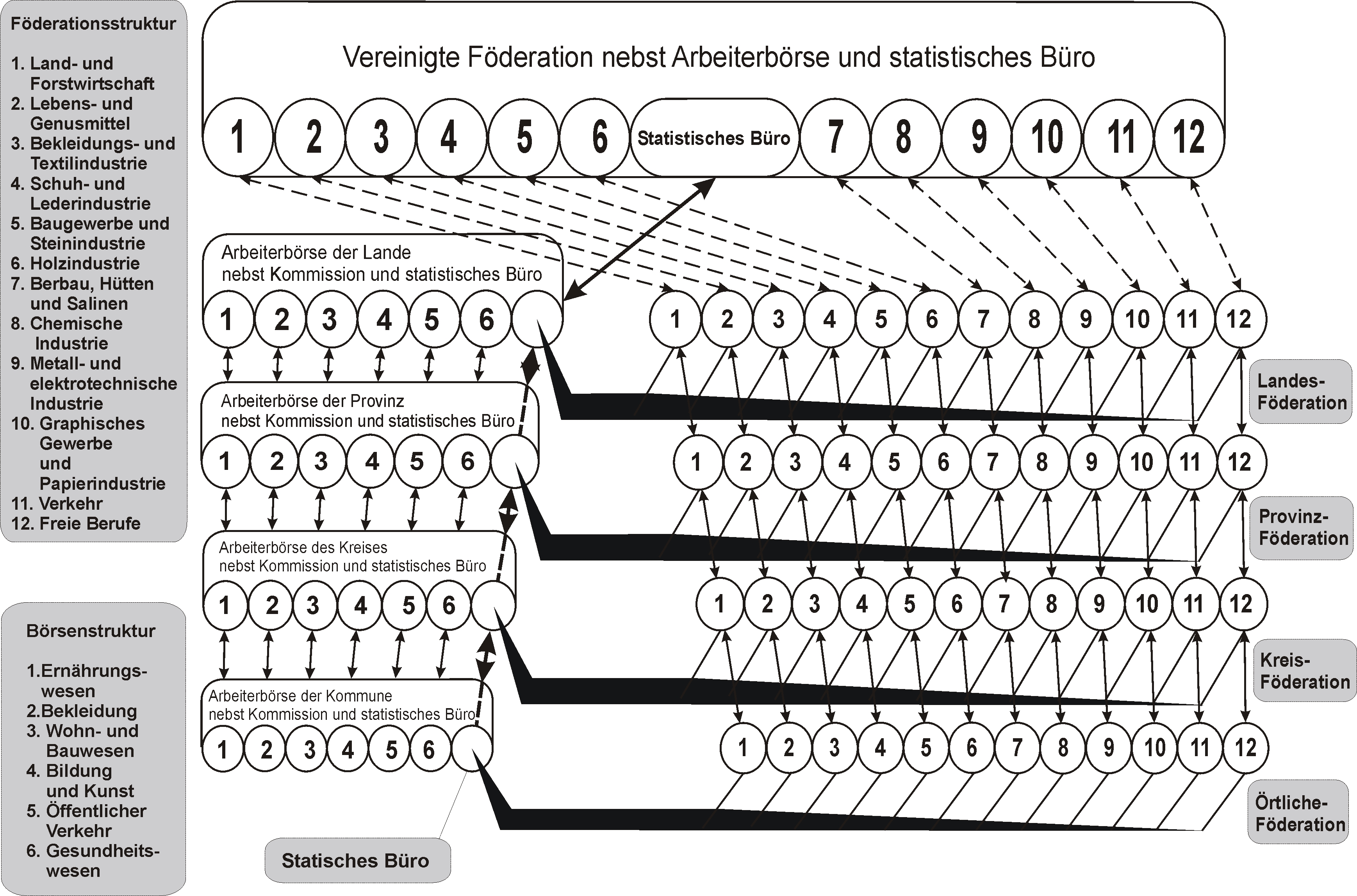 Die Grafik veranschaulicht die Organisationsstruktur der Arbeiterbörsen nach den Vorstellungen deutscher Syndikalisten. Veröffentlicht wurde die Grafik 1923.